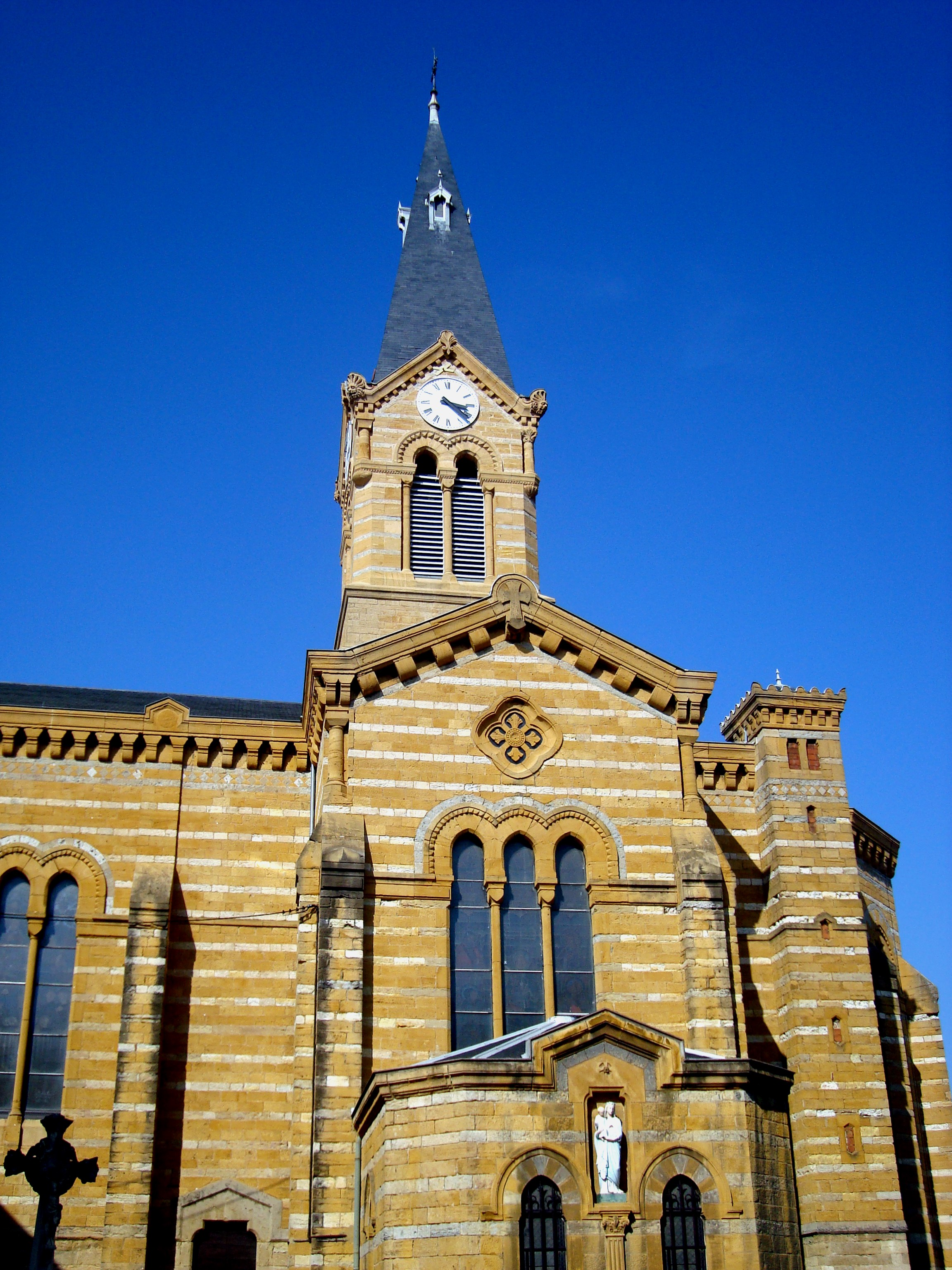 Église Saint-Irénée, Bessenay, Rhône, France.